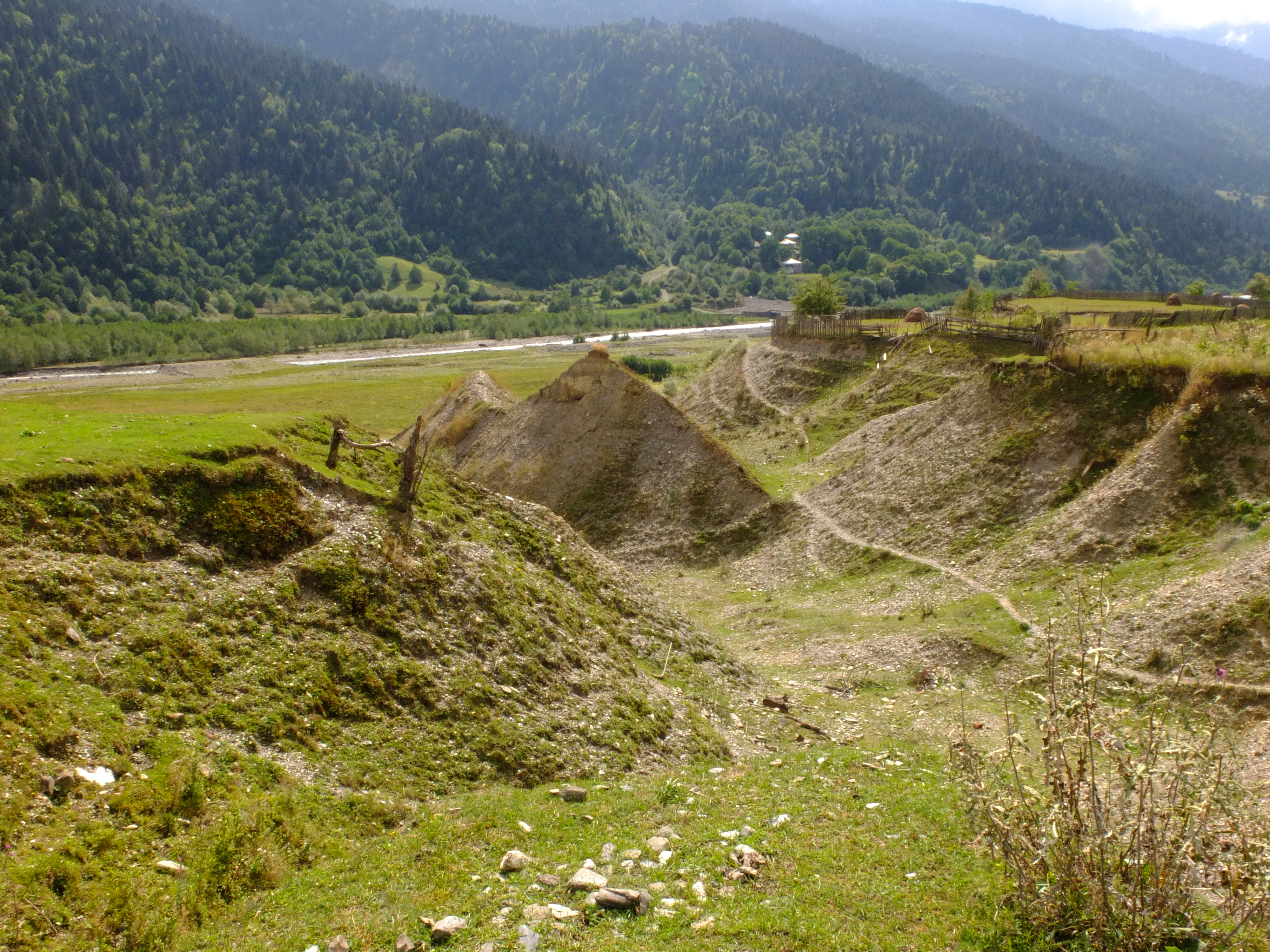 Der Blick auf das Flusstal des Zcheniszqali nördlich von Lentekhi zeigt die für Swanetien typische extensive Weideviehhaltung.